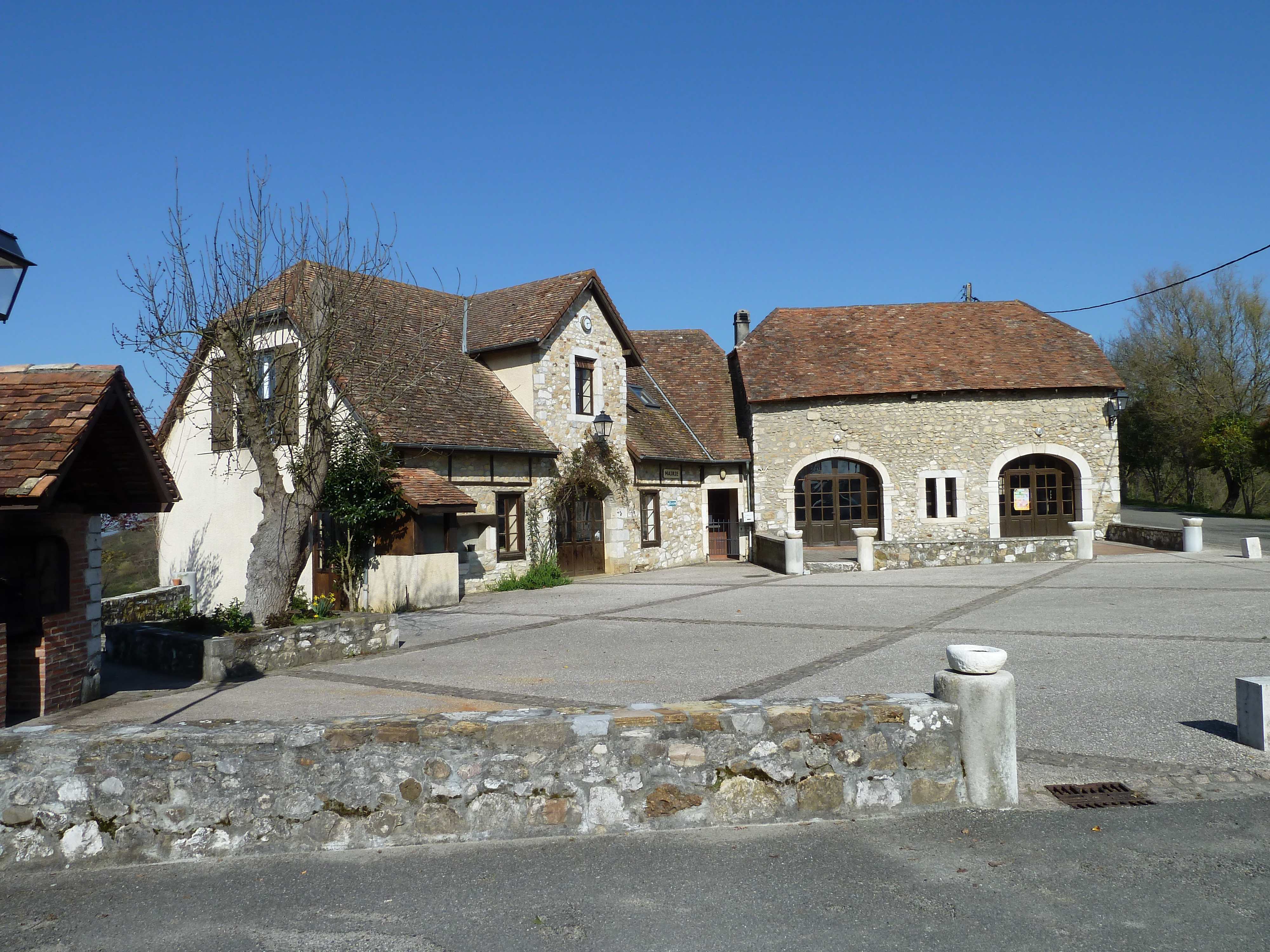 Centre de Castetner